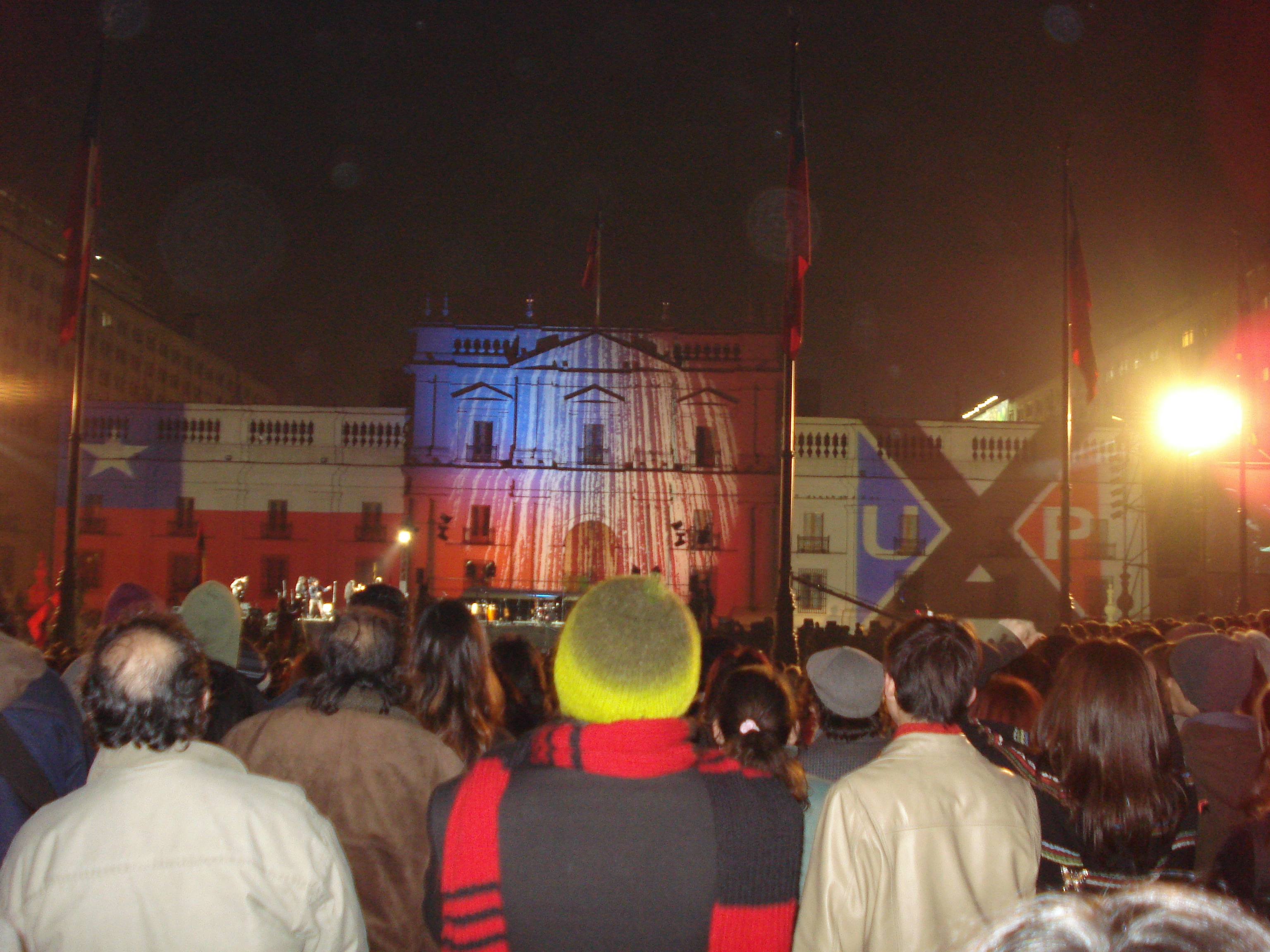 Centenario de Salvador Allende: el Palacio de la Moneda iluminado con la bandera de Chile y el símbolo de la Unidad Popular.